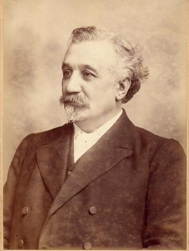 Ruben Saillens (1855-1942), chantre, auteur, pasteur, évangéliste protestant français.